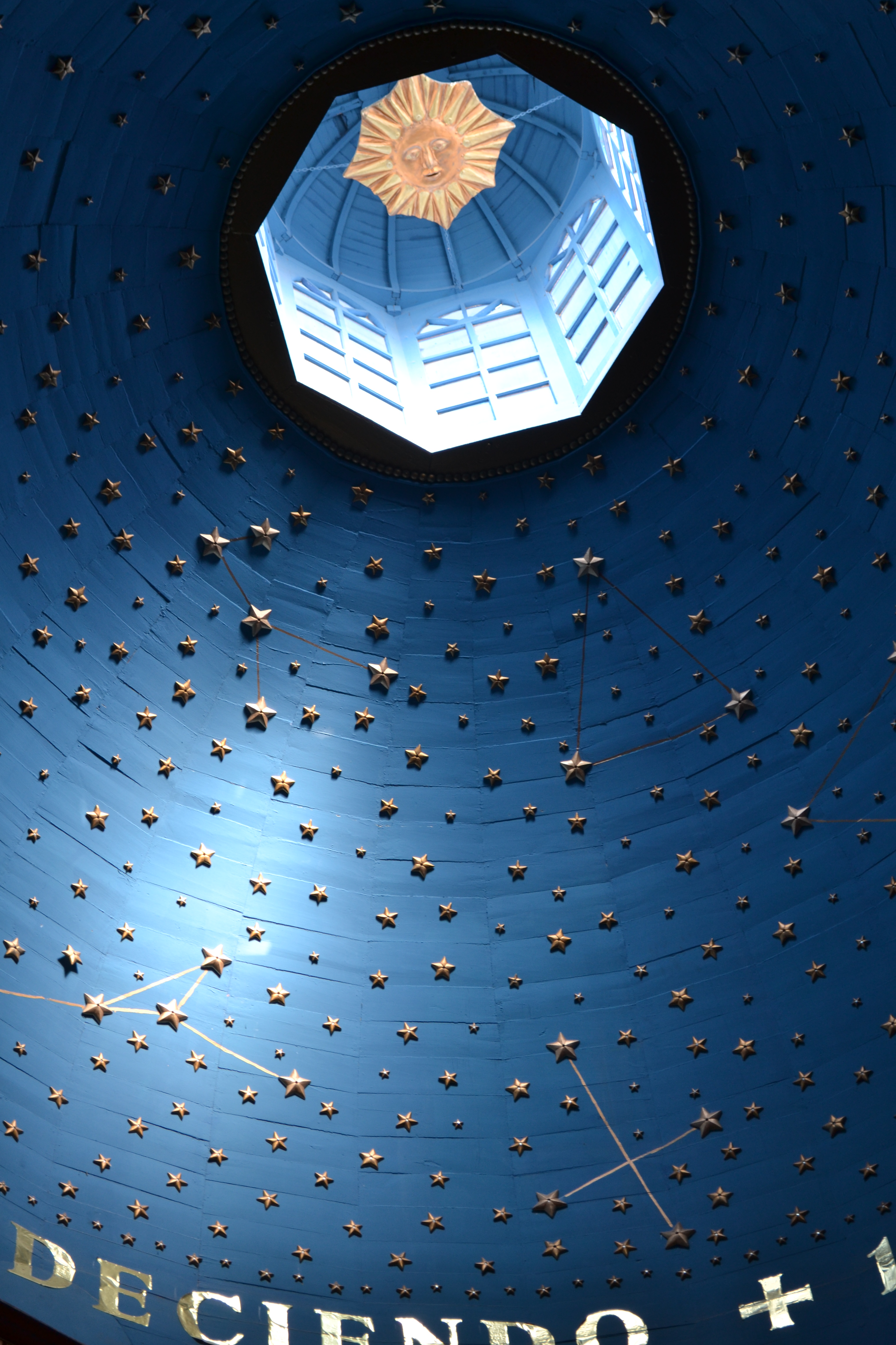 Pueblo de La Tirana This is a photo of a national monument in Chile: 296